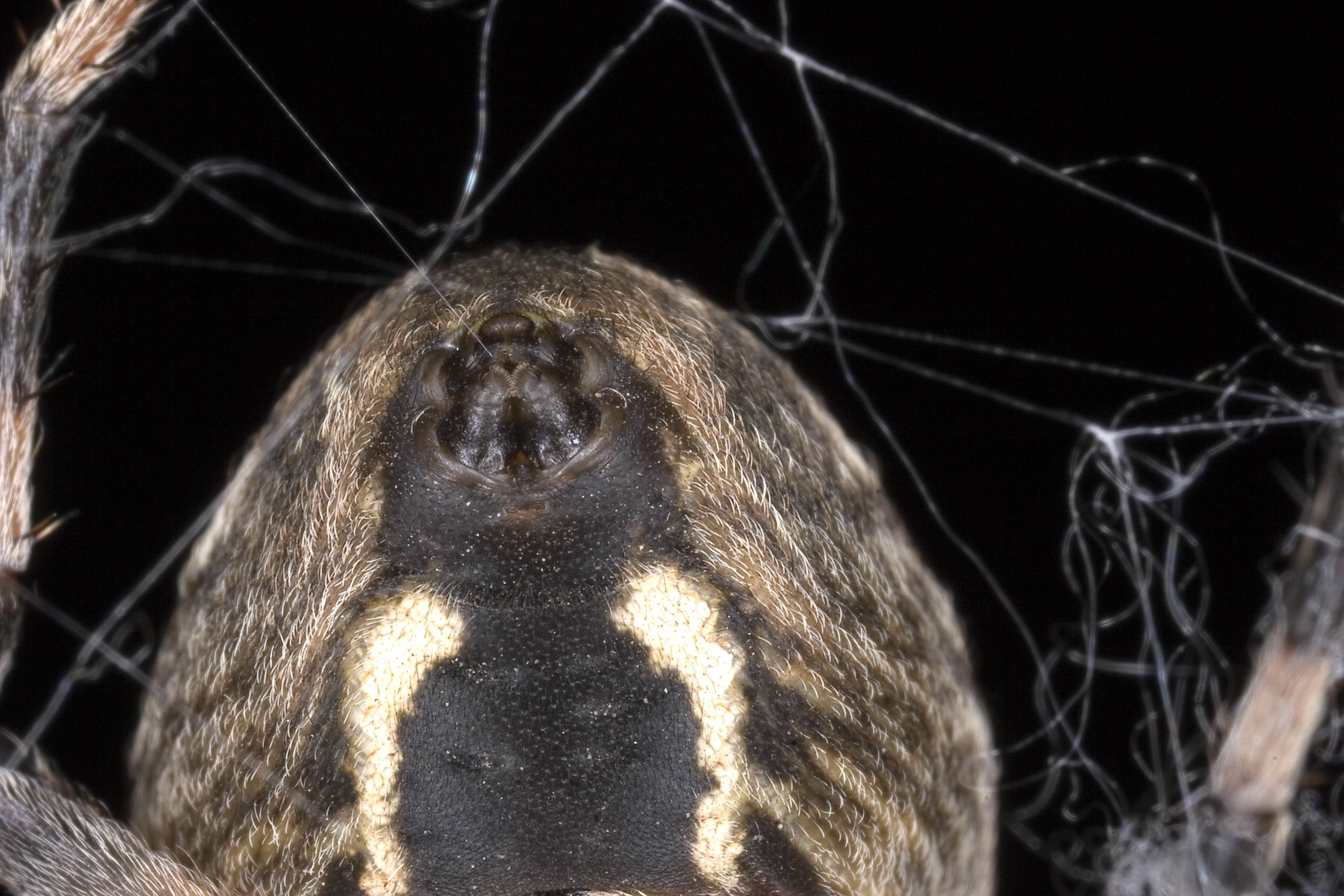 Spinnendetail Location: Dresden, Blaues Wunder (Saxony, Germany) 8/65 f16 Film / Speed: ISO 100 Comment: Canon Ring Flash MR-14EX